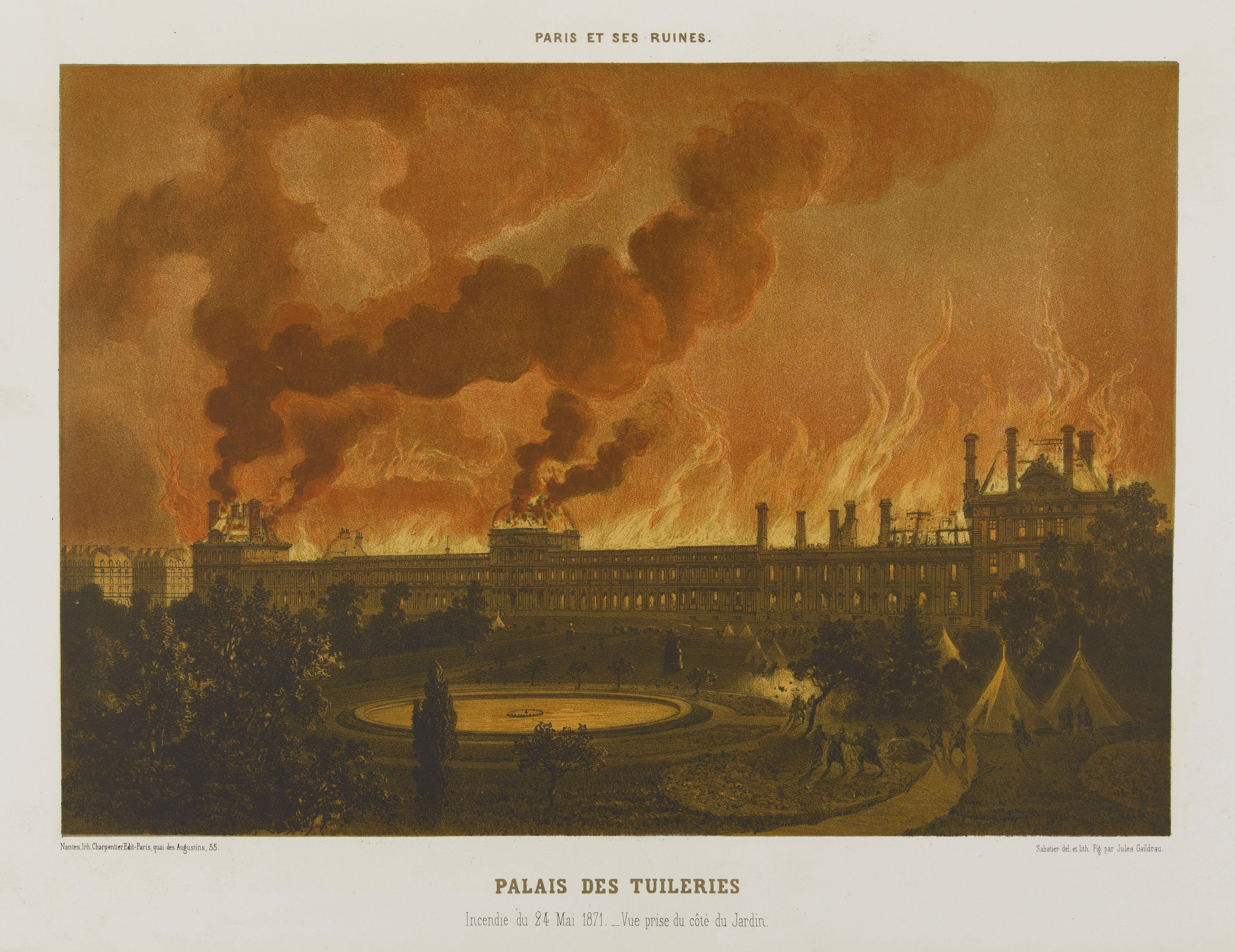 Exposition La Commune de Paris à l'Hôtel de Ville de Paris (18 mars - 28 mai 2011) - 24 mai, incendie des Tuilleries - Lithographie de Léon Sabatier et Albert Adam pour Paris et ses ruines publié en 1873 - Bibliothèque historique de la Ville de Paris.